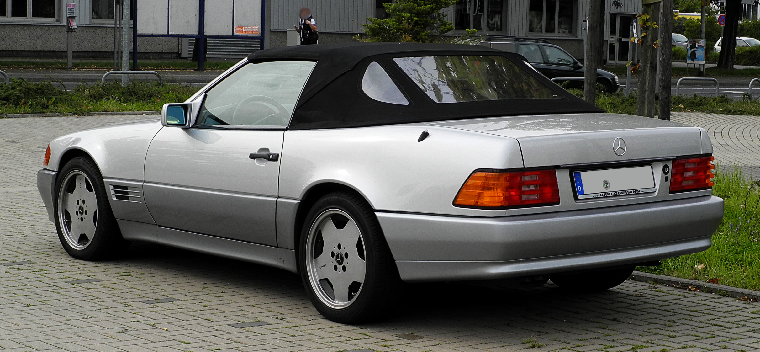 Mercedes-Benz SL-Klasse (R 129)